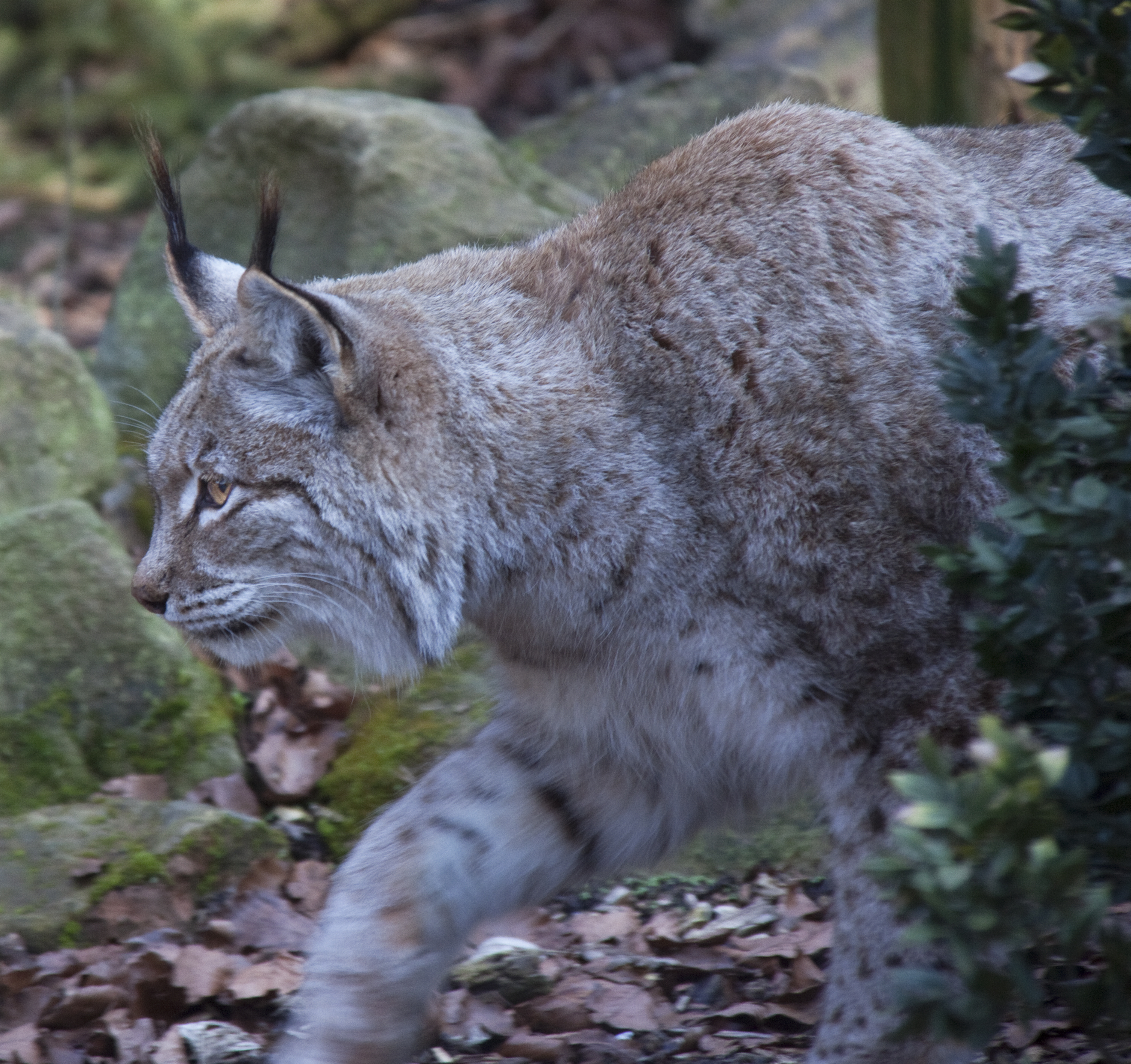 Stalking Lynx